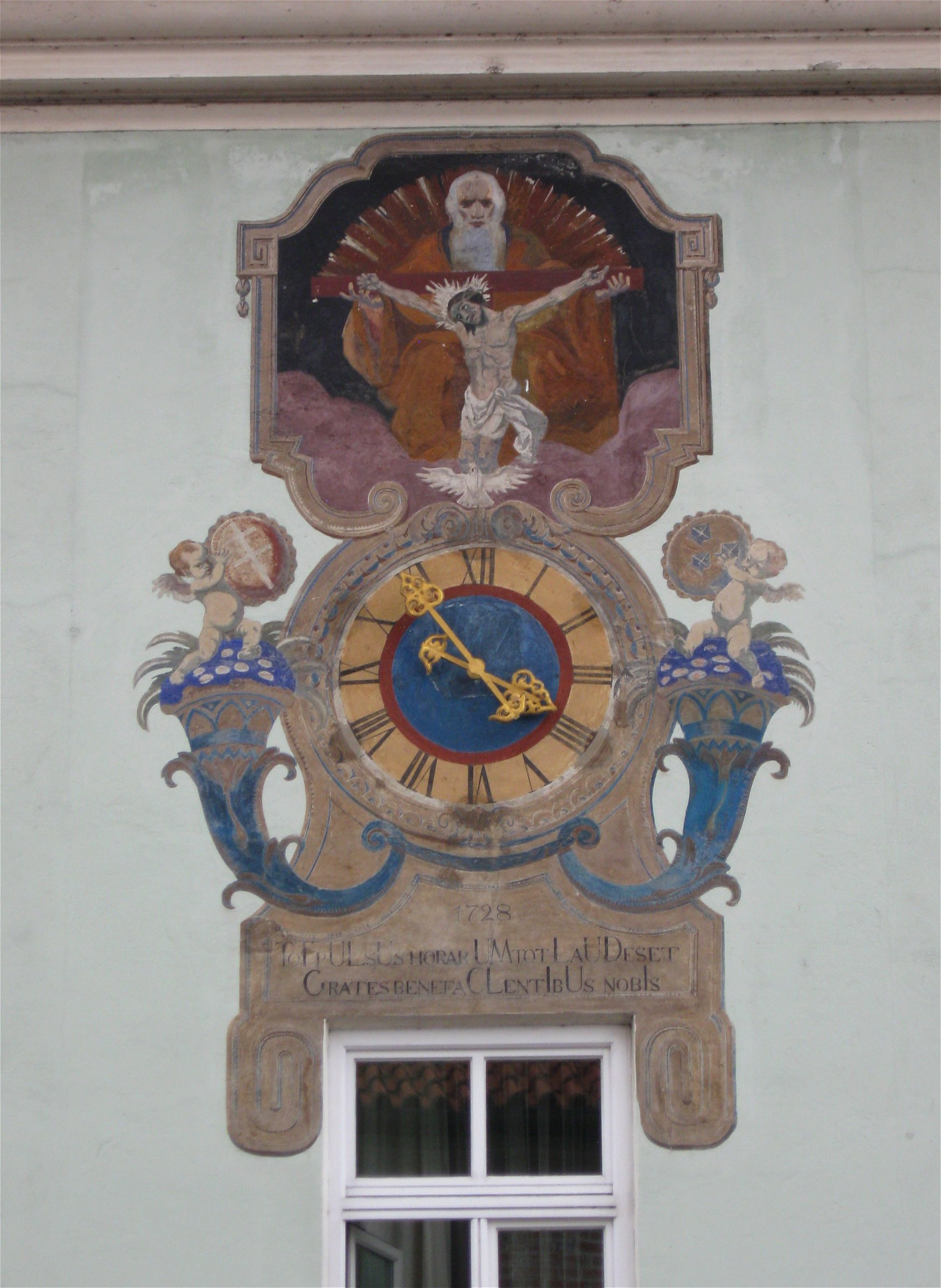 Altstadt 97; Hl.-Geist-Spital, weitläufiger dreigeschossiger Gebäudekomplex mit Walmdach um einen geschlossenen rechteckigen Innenhof, 1208 erstmals urkundlich erwähnt, im Kern mittelalterlich, durchgreifender Umbau 1722-1728 durch die Baumeister Johann Georg Hirschstetter und Martin Ehehamb; mit Ausstattung; im Ostflügel Hauskapelle; mit Ausstattung u.a. von Wenzel und Christian Jorhan; im Westflügel sog. "Krankenkapelle", heute Aussegnungsraum; mit Ausstattung; ehem. Scheune und Stallungen hinter der Vierflügelanlage liegend, wohl 2. H. 19. Jahrhundert. D-2-61-000-78